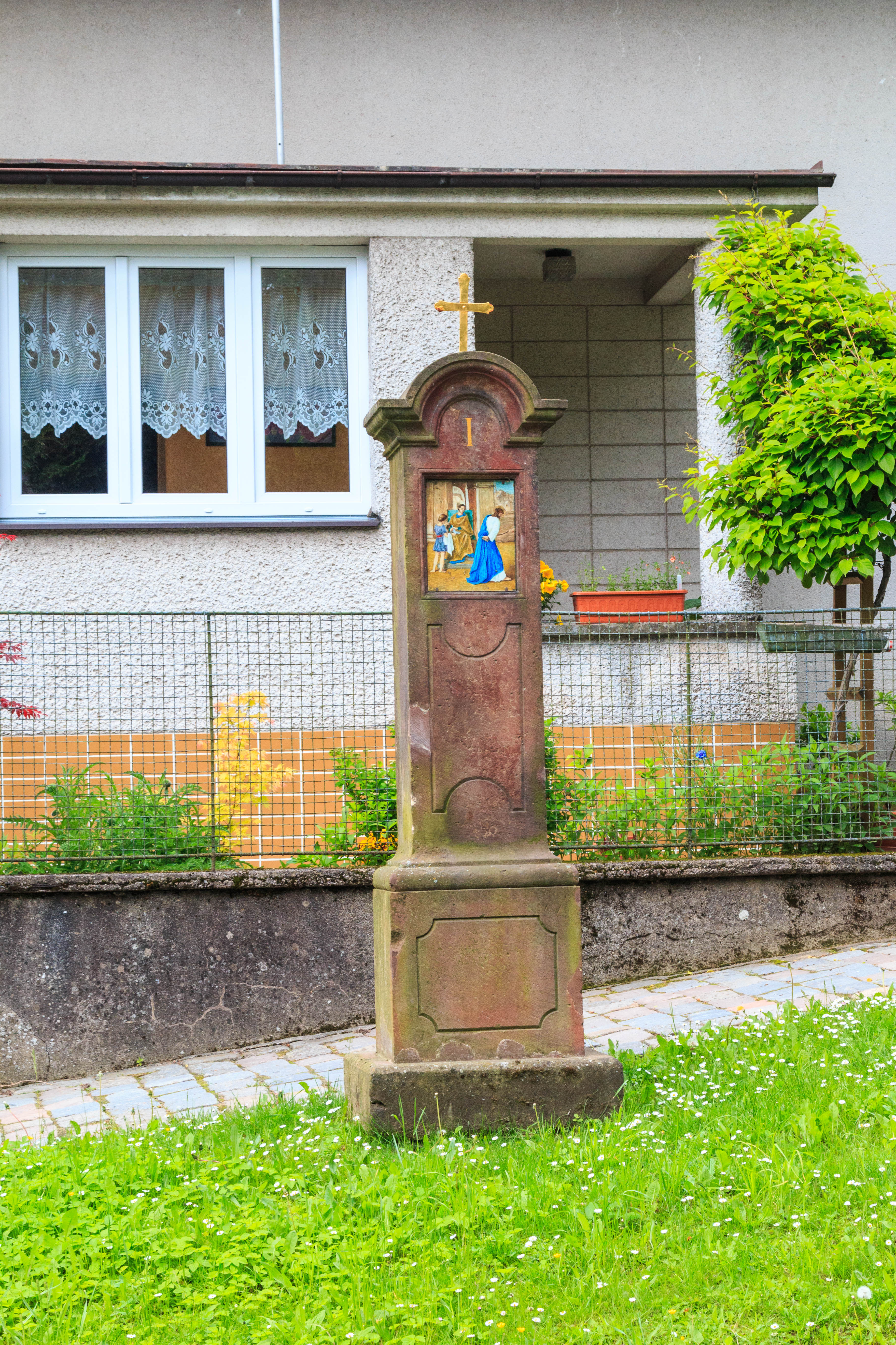 Calvary in Nová Paka